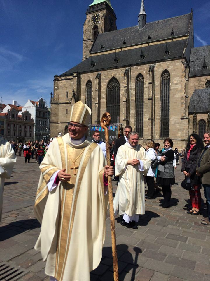 Nach der Bischofsweihe vom neuen Bischof der Diözese Pilsen.